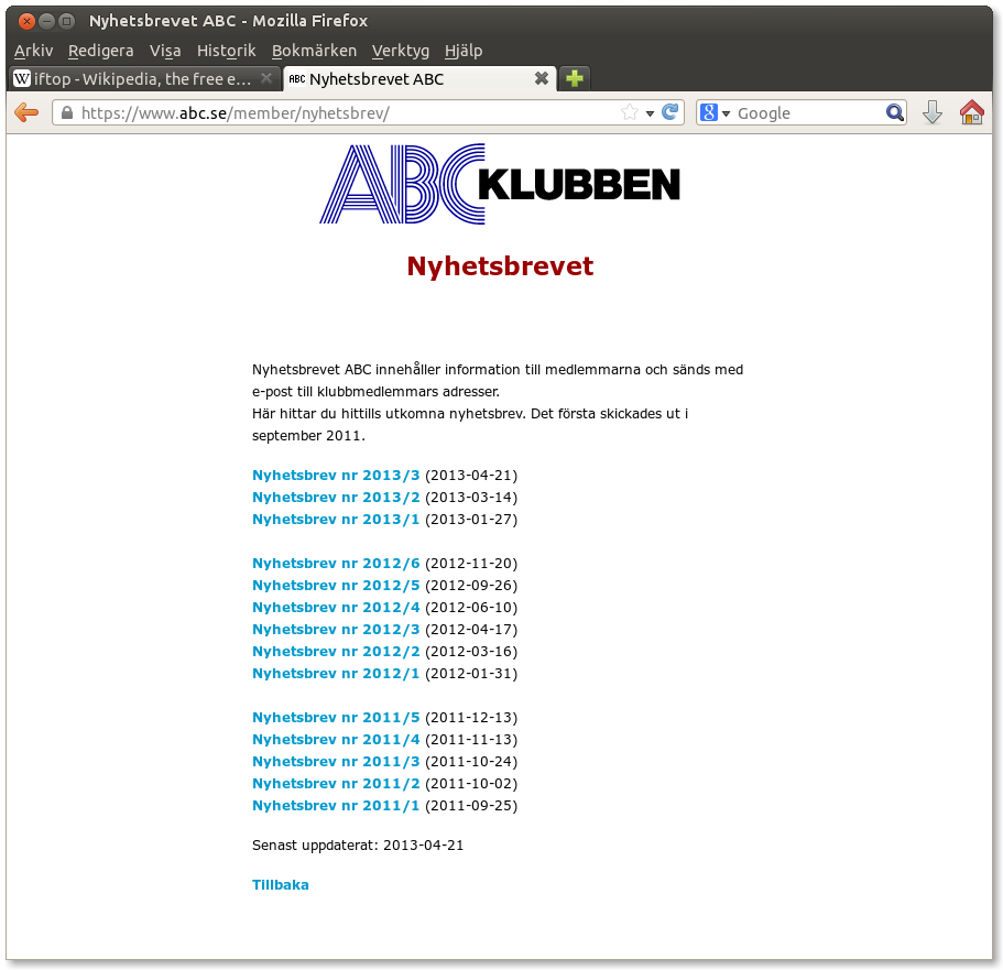 Skärmdump av samlingssidan för ABC-klubbens nyhetsbrev. Mozilla Firefox i Ubuntu användes som webbläsare.